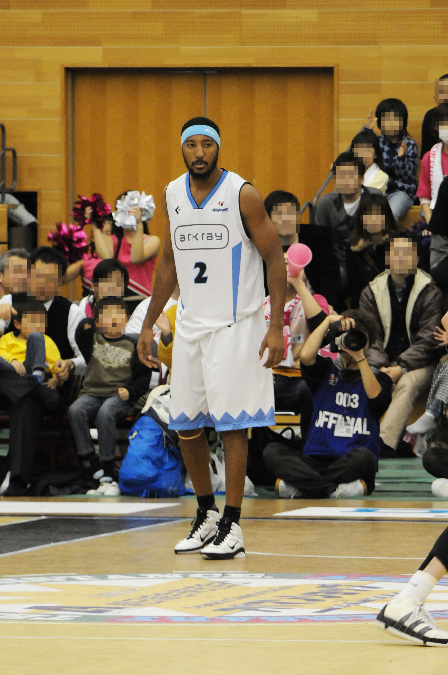 京都ハンナリーズのレジー・ウォーレン選手。能代市総合体育館で。